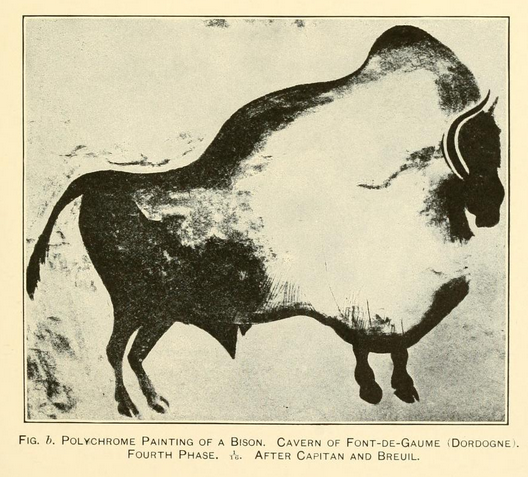 Grotte de Font-de-Gaume. Bisonte